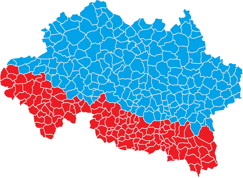 Frontière entre langue d'oc (rouge) et d'oïl (bleu) dans le département de l'Allier. Limite traditionelle et point de vue de nombreux spécialistes (Frantz Brunet, Viple, Bardet ; point de vue proche de Bonnaud et Reichel).